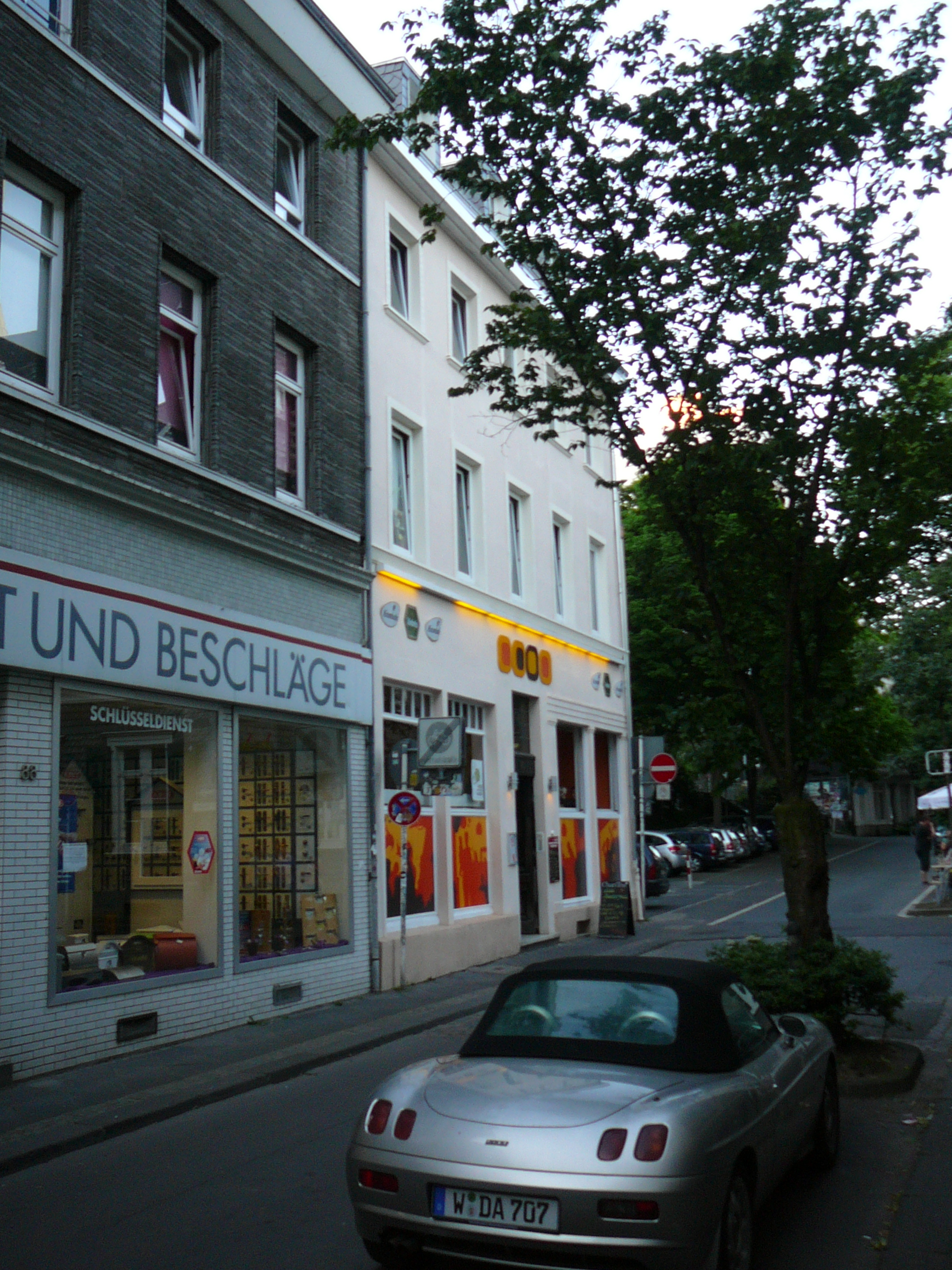 Luisenstraße 88 und Luisenstraße 86This is a photograph of an architectural monument. 1008